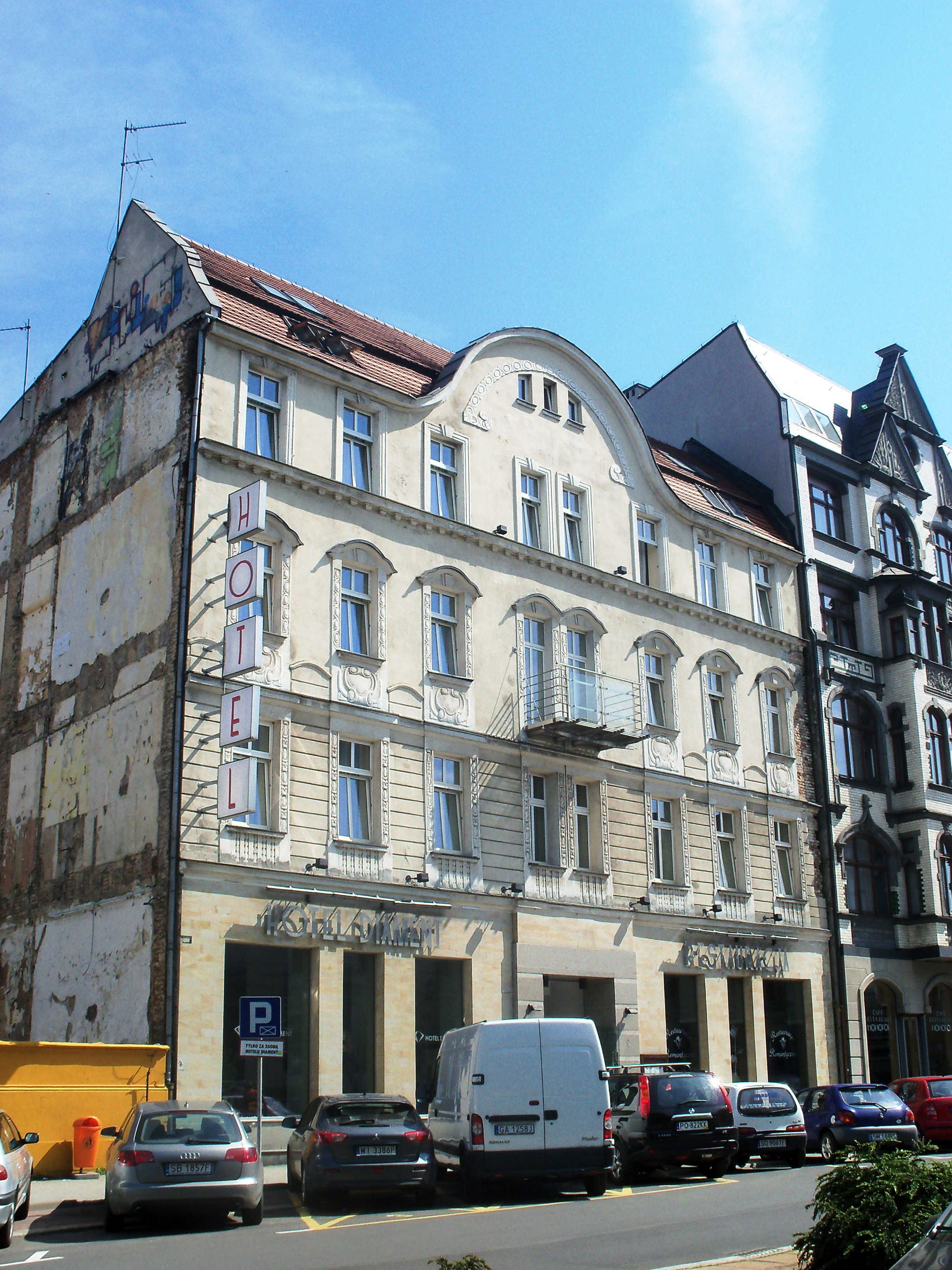 Budynek przy ul. Dworcowej 9 w Katowicach - Hotel Diament